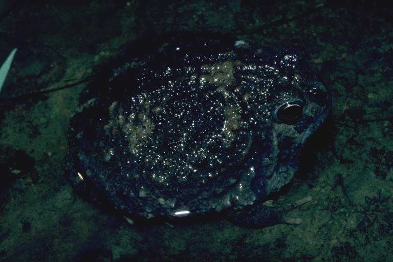 Notaden melanoscaphus